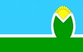 Bandera de la ciudad de Malabrigo, Santa Fe, Argentina.